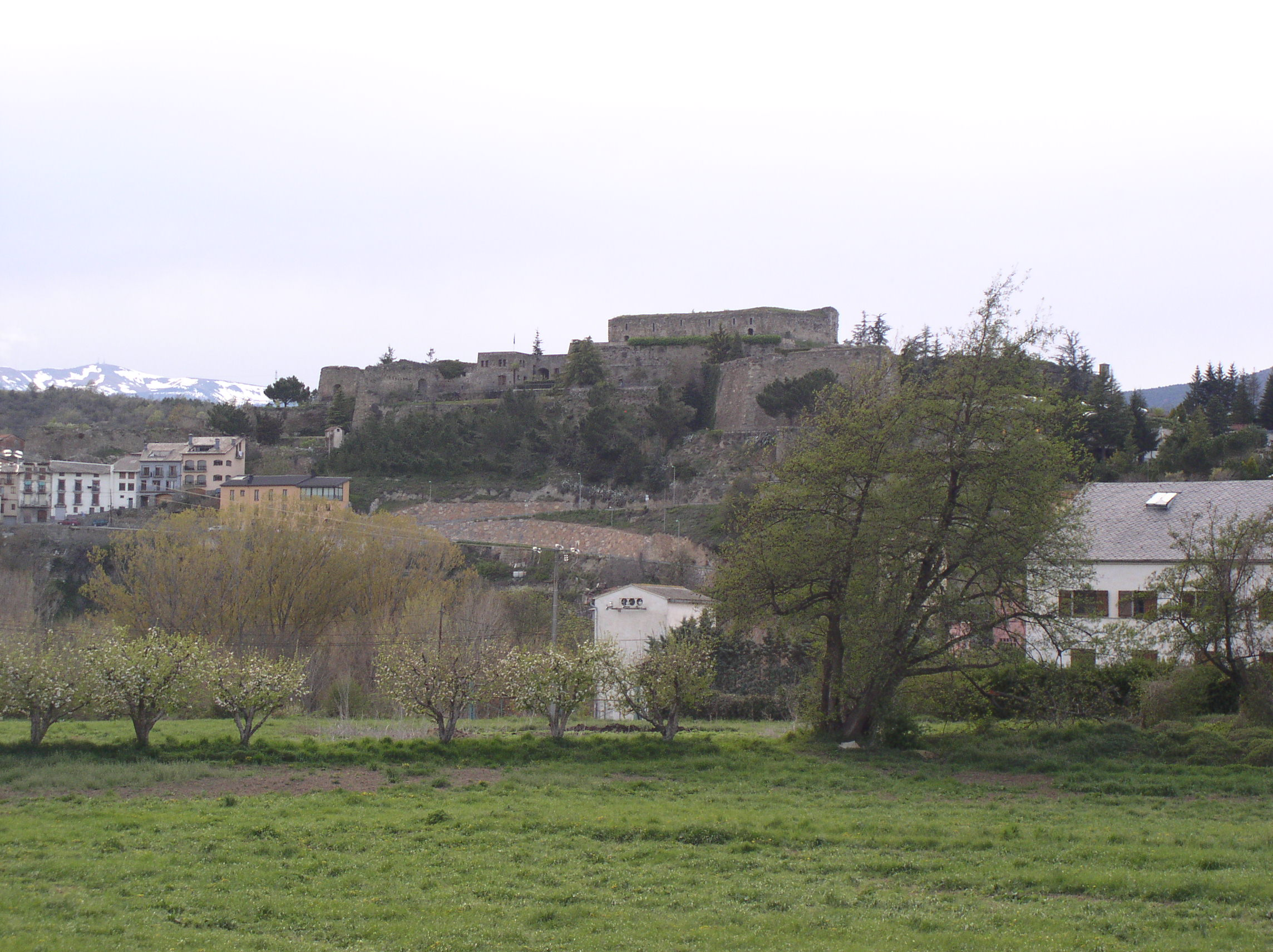 Fotografia del Castell de Castellciutat, des de la Seu d'Urgell.